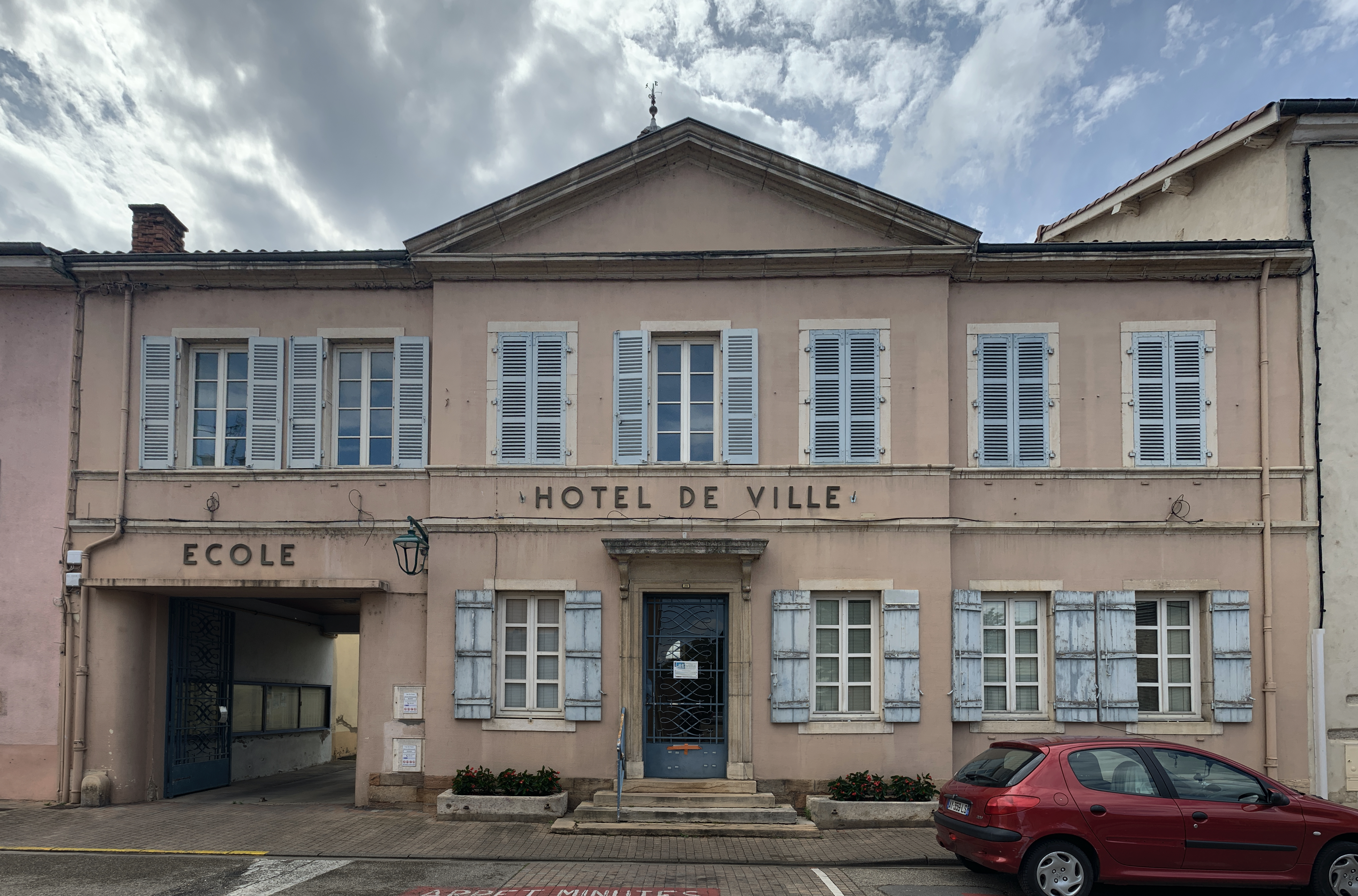 Ancien hôtel de ville de Pont-de-Veyle.